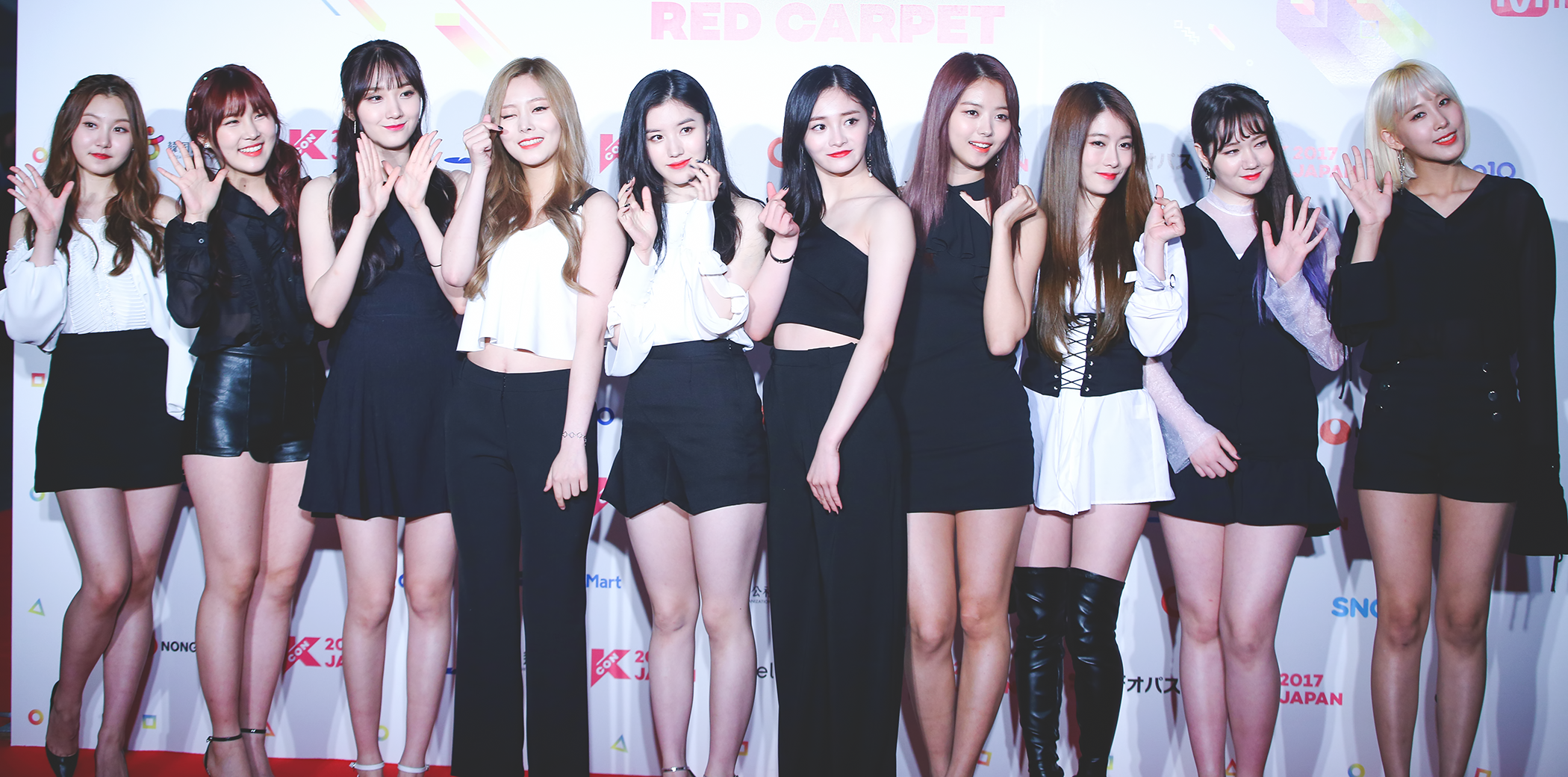 170519 프리스틴